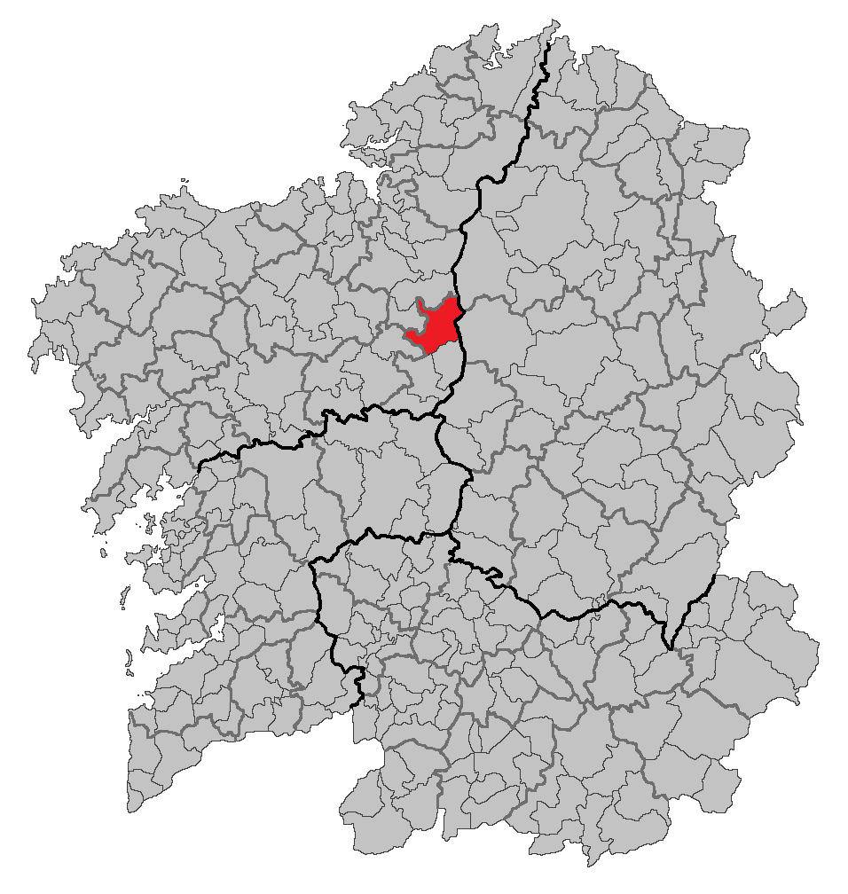 Mapa coa localización do concello de Sobrado.